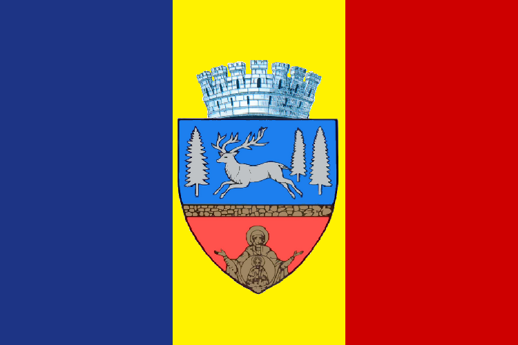 Drapelul municipiului Bacău